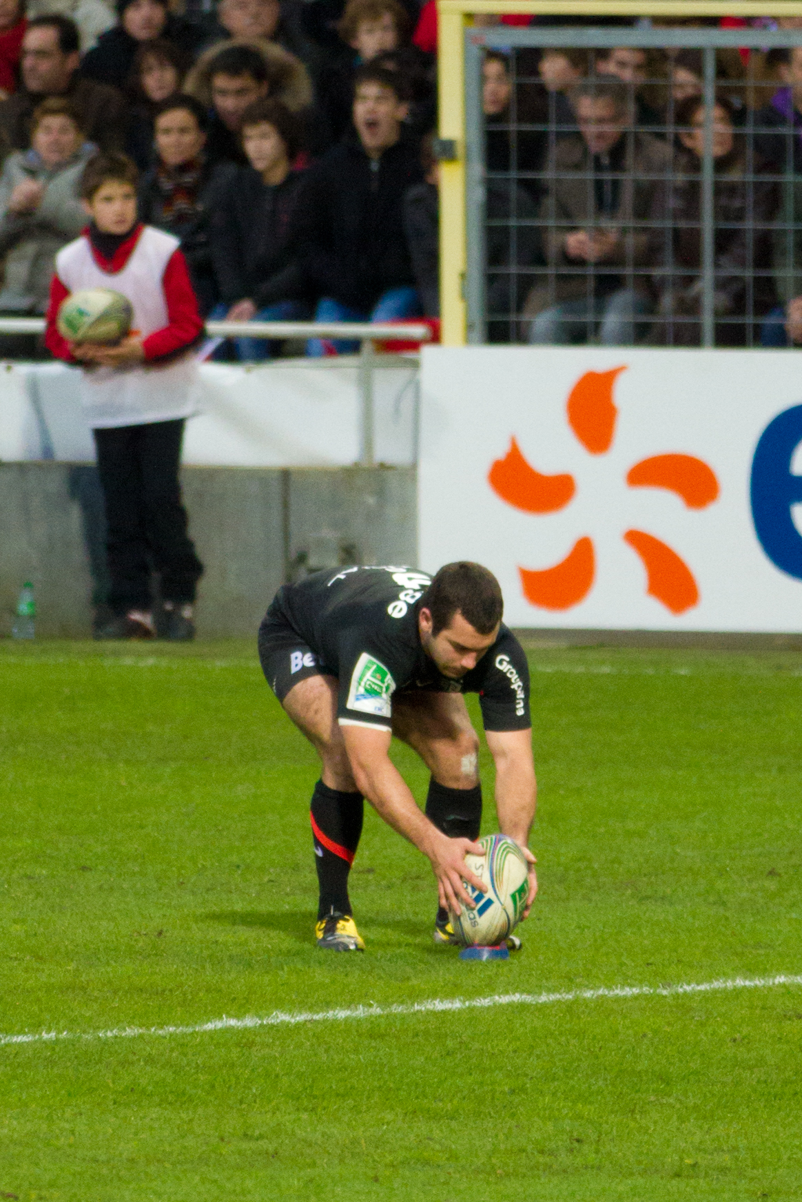 Heineken Cup 2011-2012 — 18 December 2011, Stadium. Match between: Stade toulousain — Harlequin F.C.